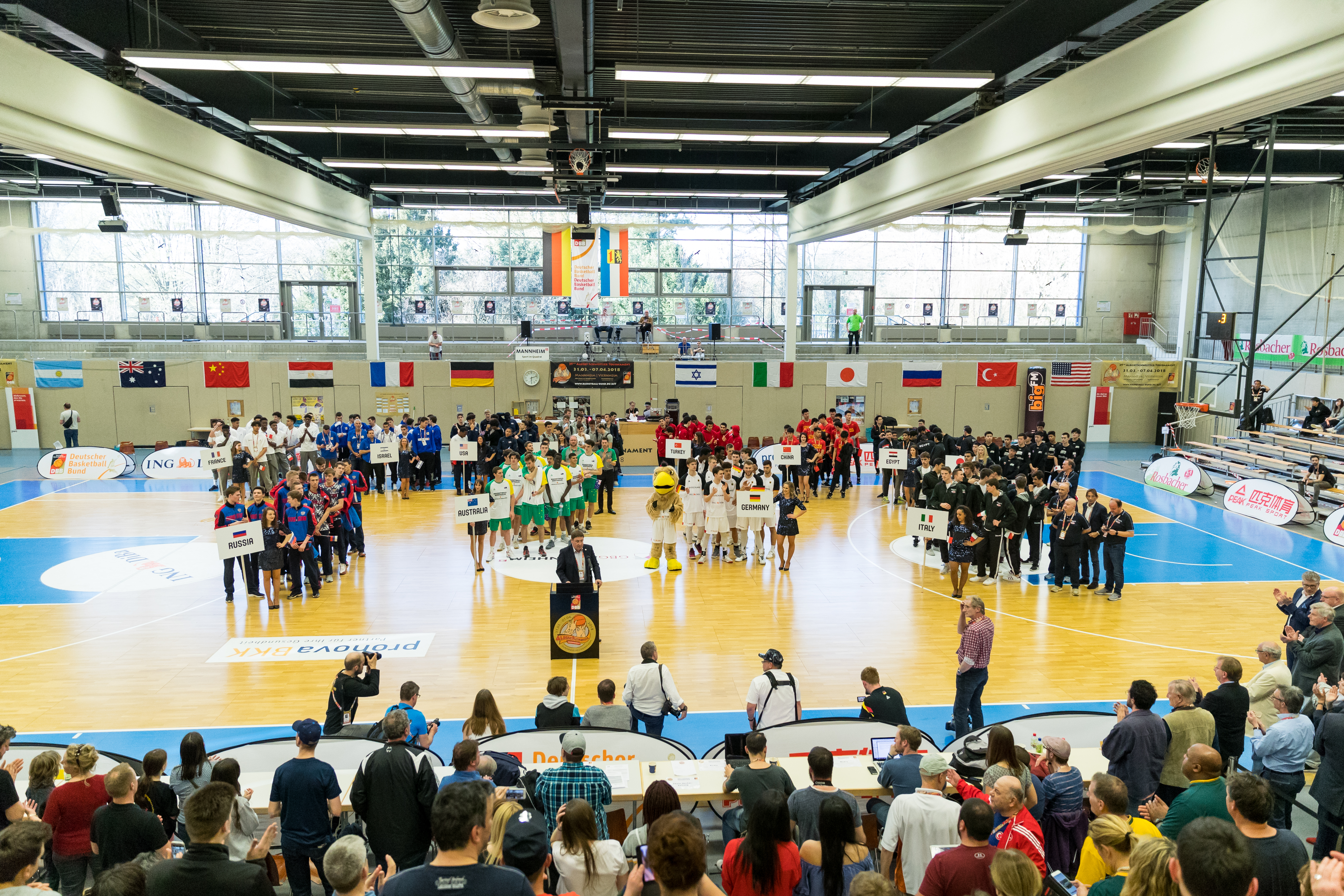 during Closing ceremony Basketball Albert Schweitzer Turnier at GBG Halle, Mannheim, Baden-Württemberg, Germany on 2018-04-07, Photo: Sven Mandel